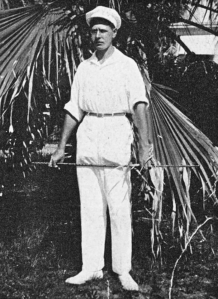 İskender Tzitaşi/Tsitaşi/Sitaşi/Chitaşi Teymurazoviç Laz dil bilimci, eğitmen, komünist aktivist